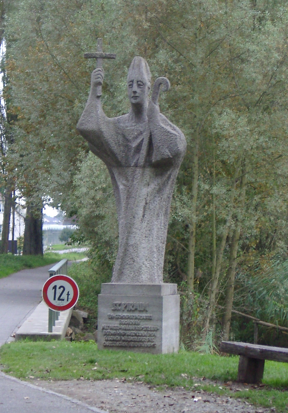 Statue des Heiligen Pirmin am Zugangsdamm zur Insel Reichenau von Bildhauerin Gisela Bär